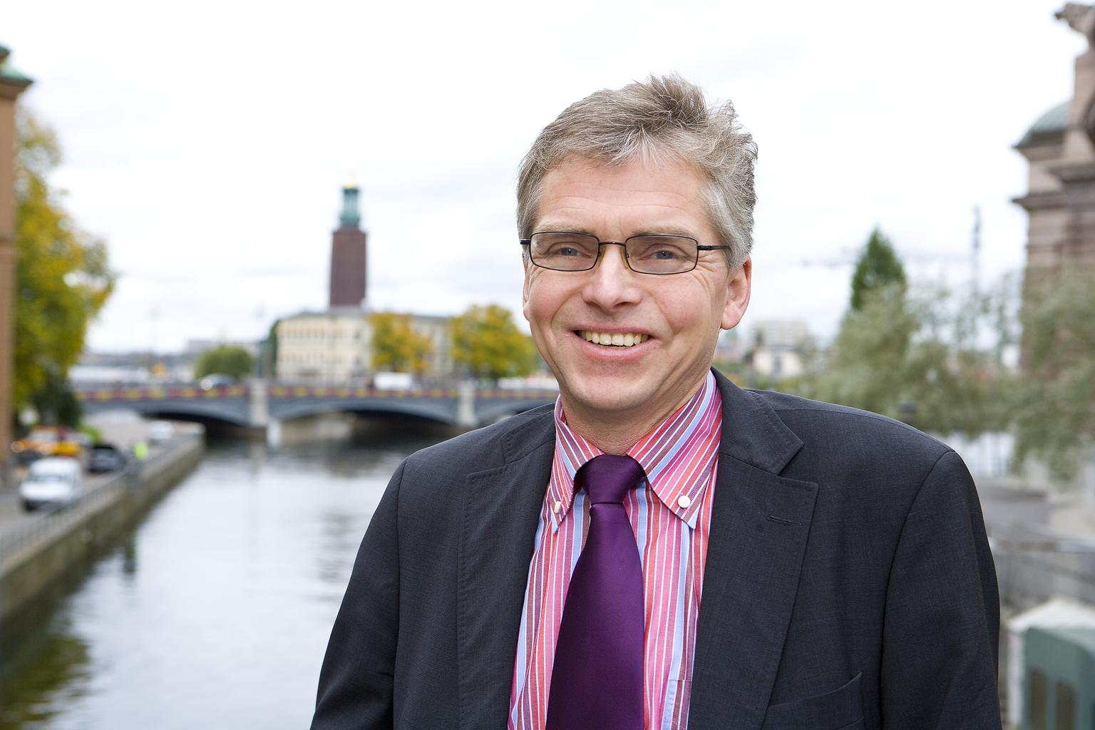 asling_per_02